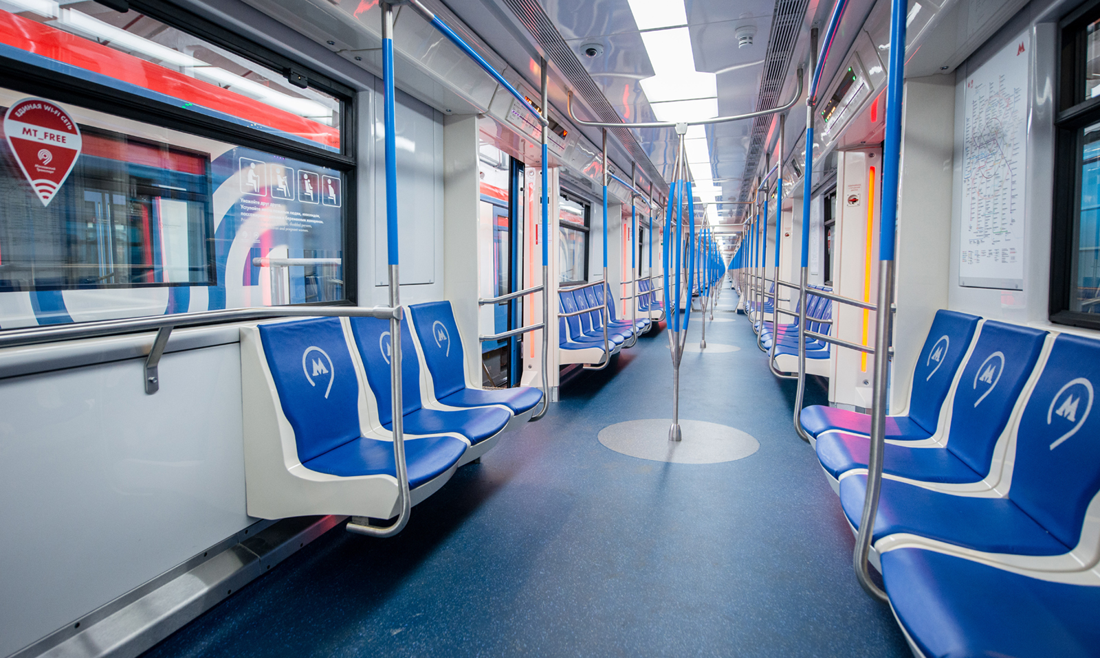 Салон головного вагона электропоезда метро 81-765/766/767 «Москва». Вид назад